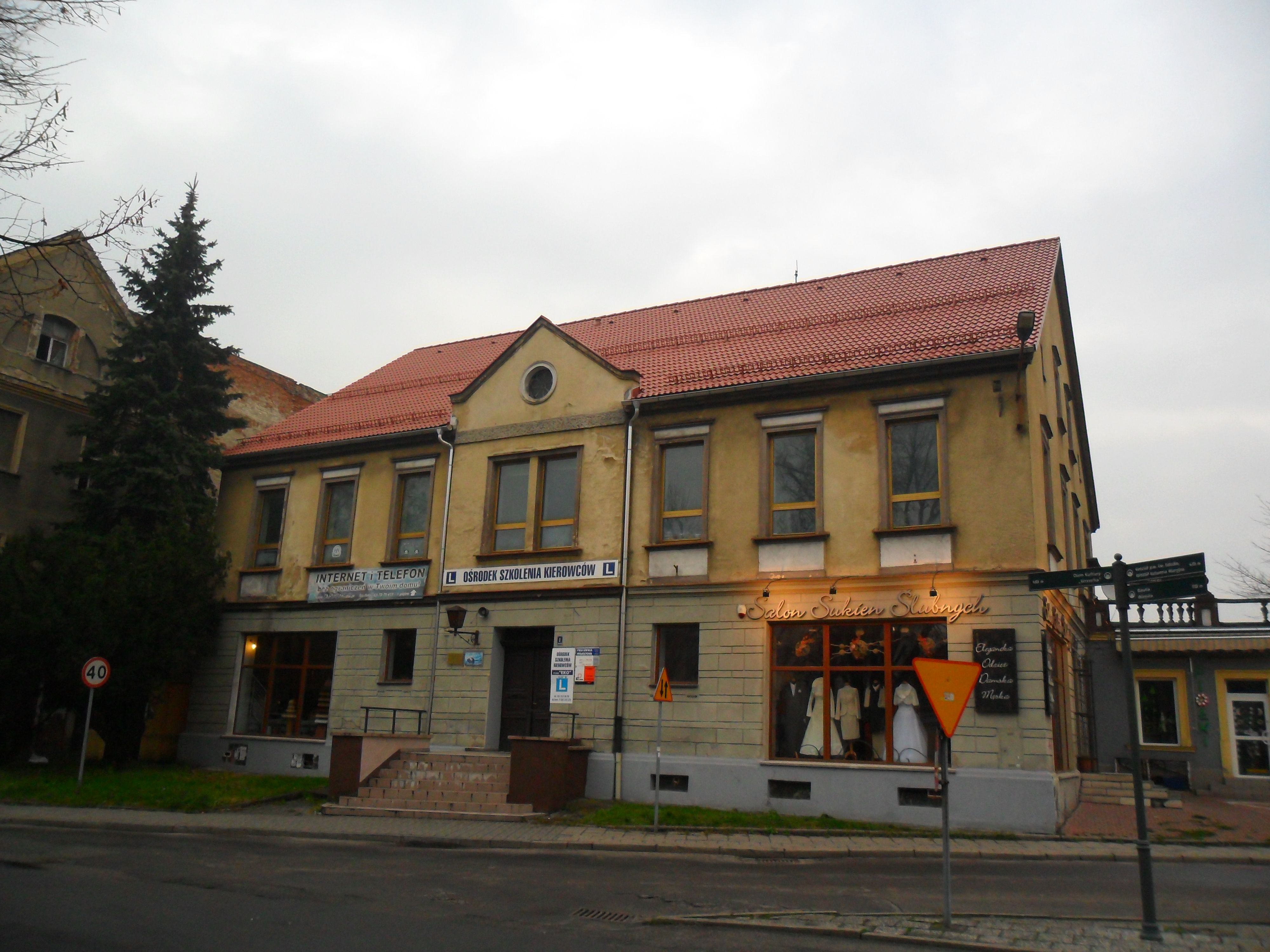 Kamienica na placu Wolności w Raciborzu